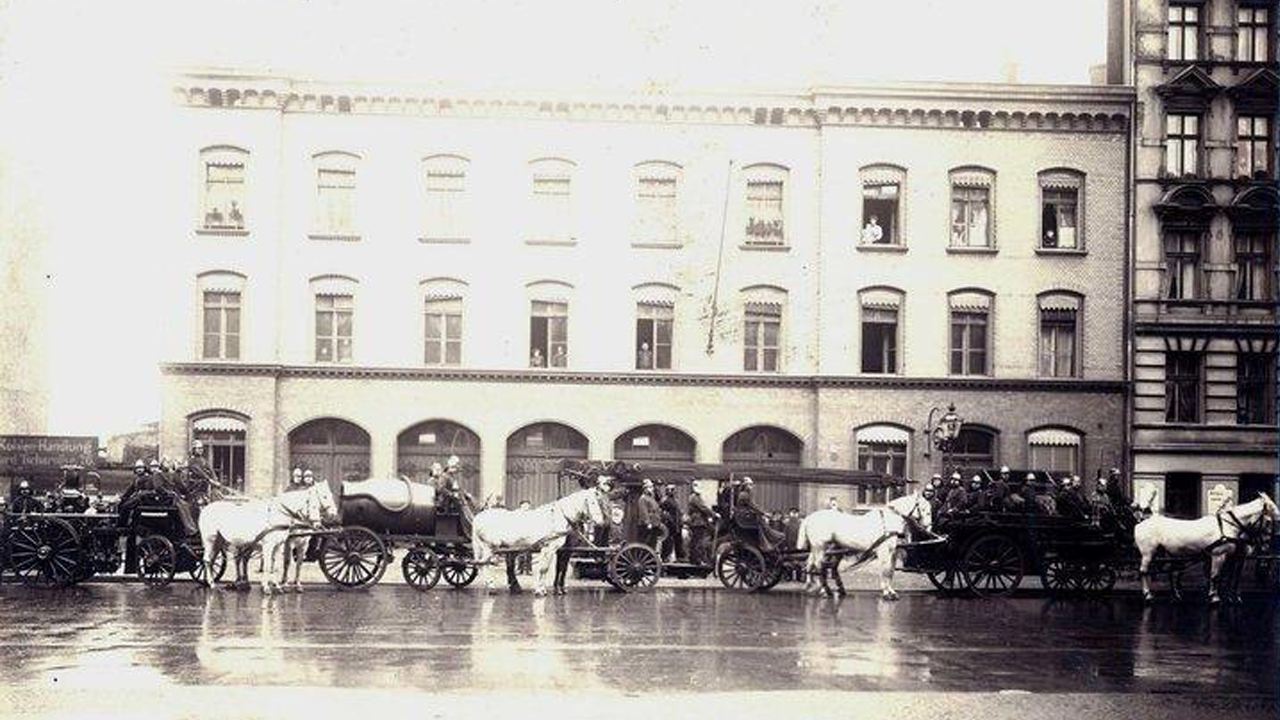 Von Schimmeln gezogene Wagen der Berliner Feuerwehr in der Oderberger Straße vor der Feuerwache Prenzlauer Berg (von links nach rechts): Spritzenwagen, Wasserwagen, Leiterwagen, Mannschaftswagen